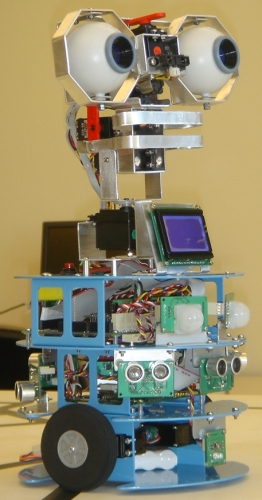 Drk8080 robot.